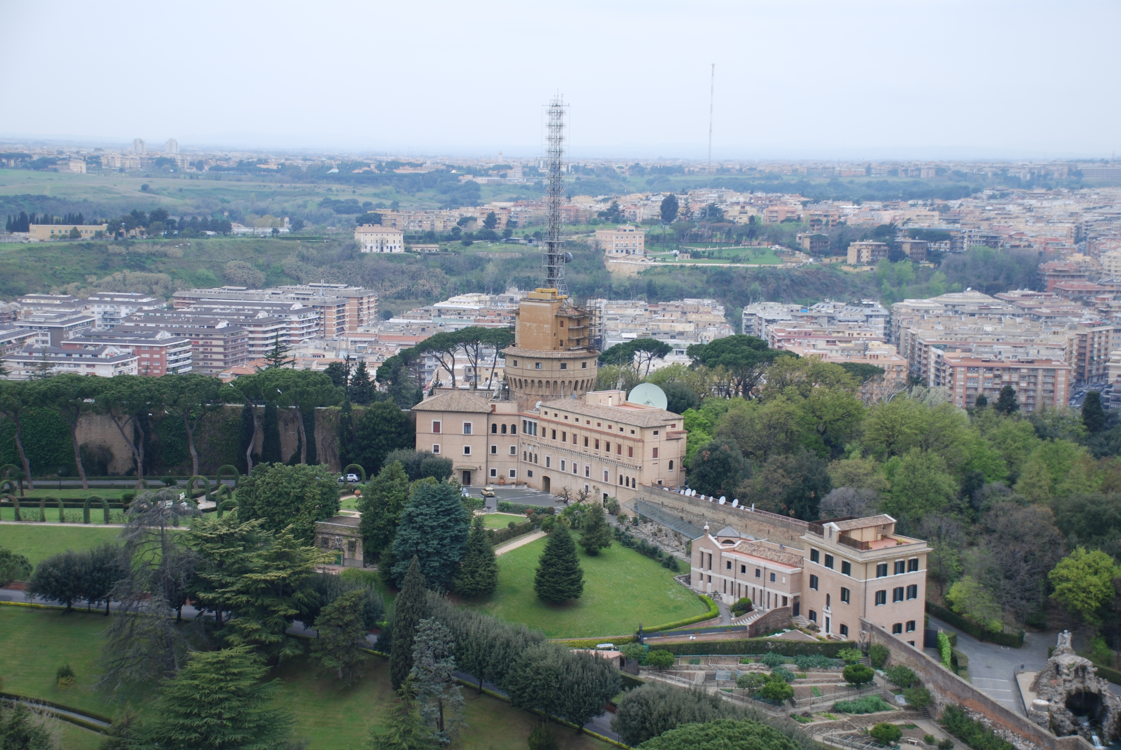 Radio Vaticana